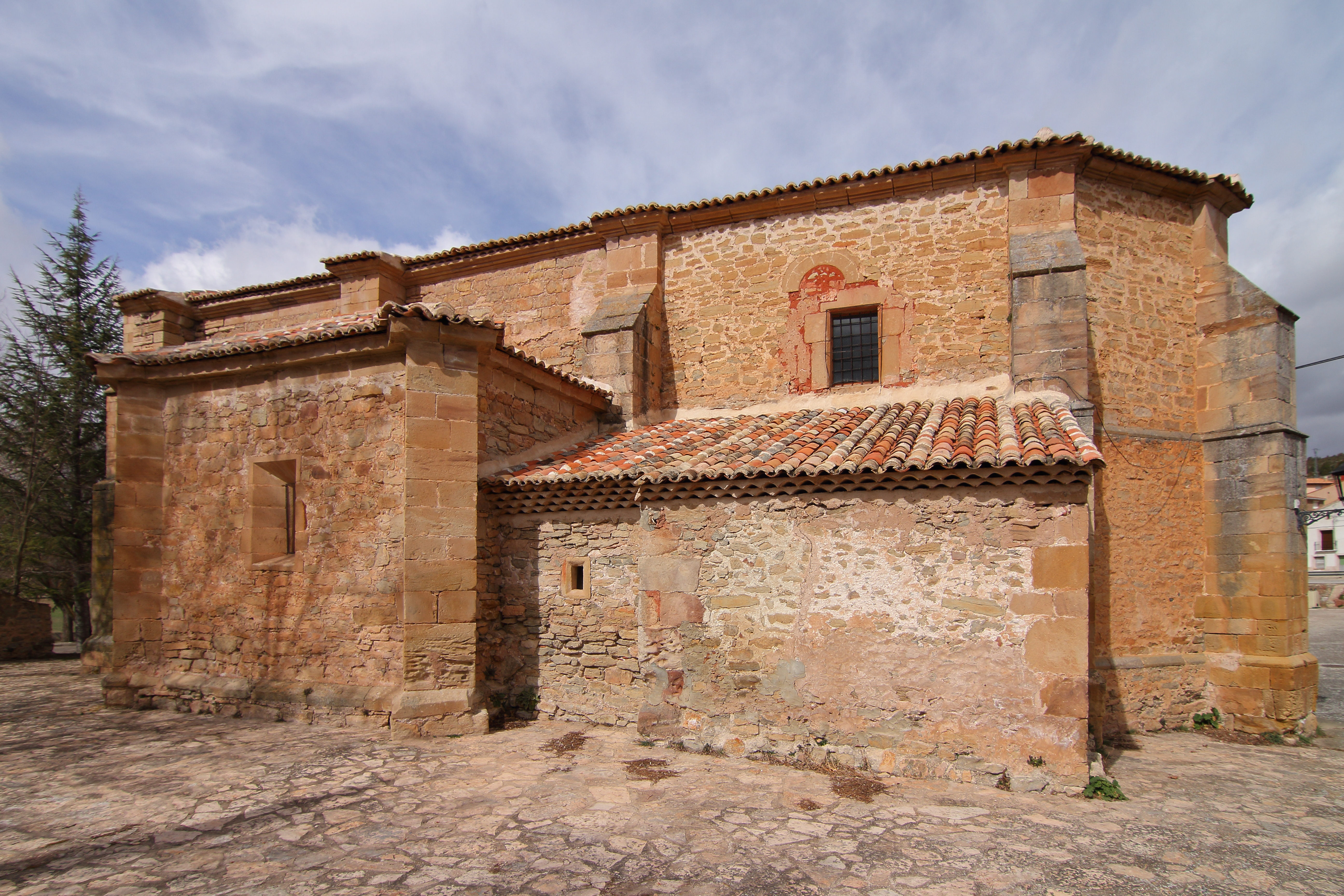 Herrería, Iglesia Parroquial, s.XVI, 03